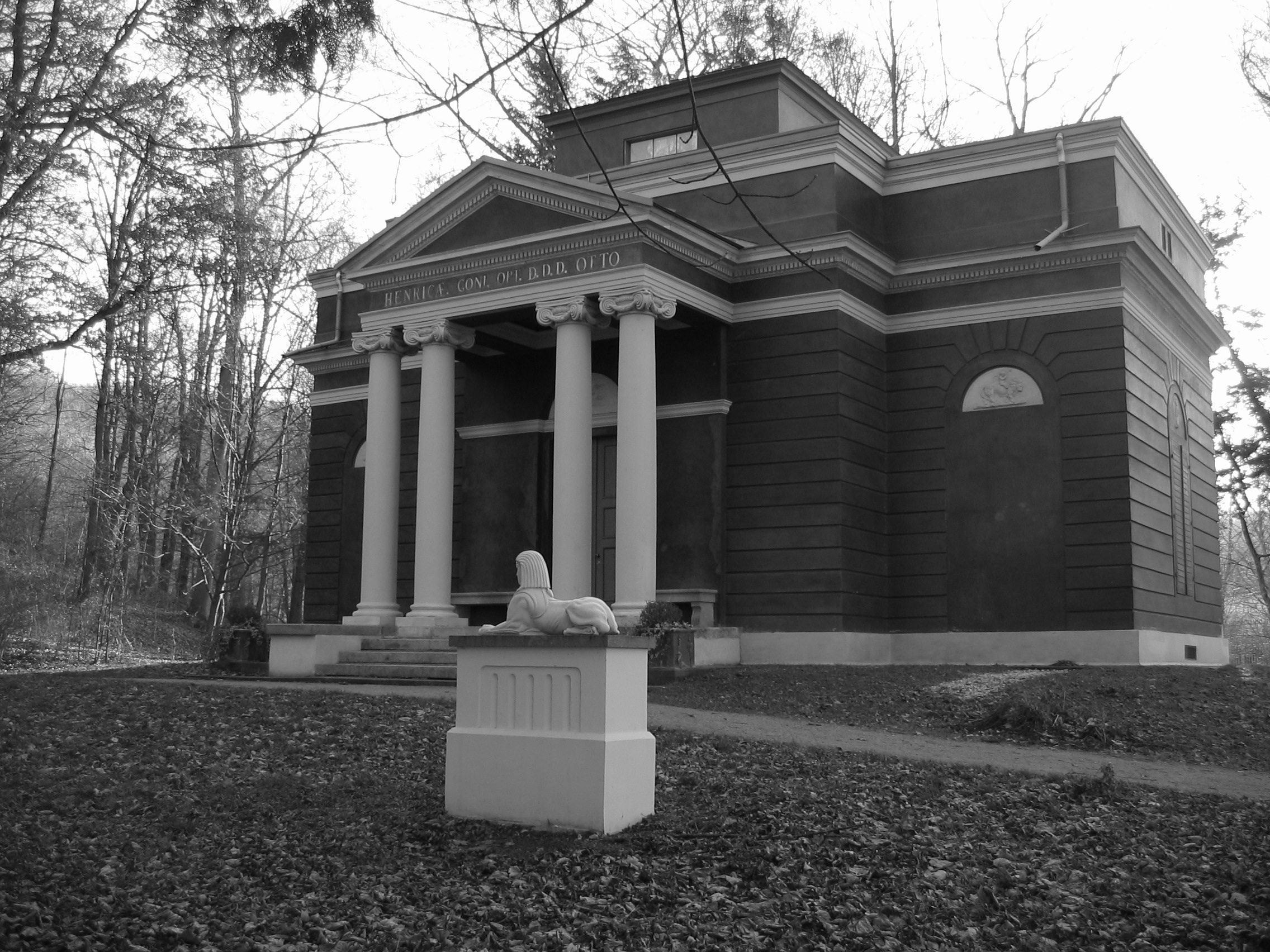 Das Bild zeigt das Badehaus im Grünefelder Park in Waldenburg/sachsen